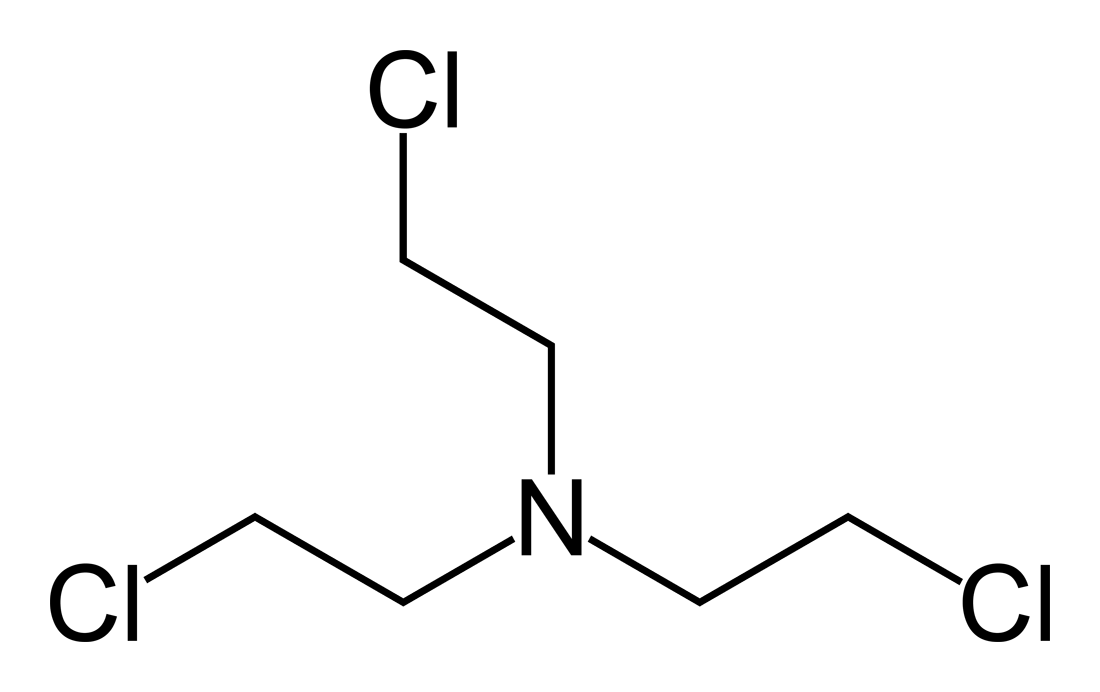 Nitrogen-mustard-HN3